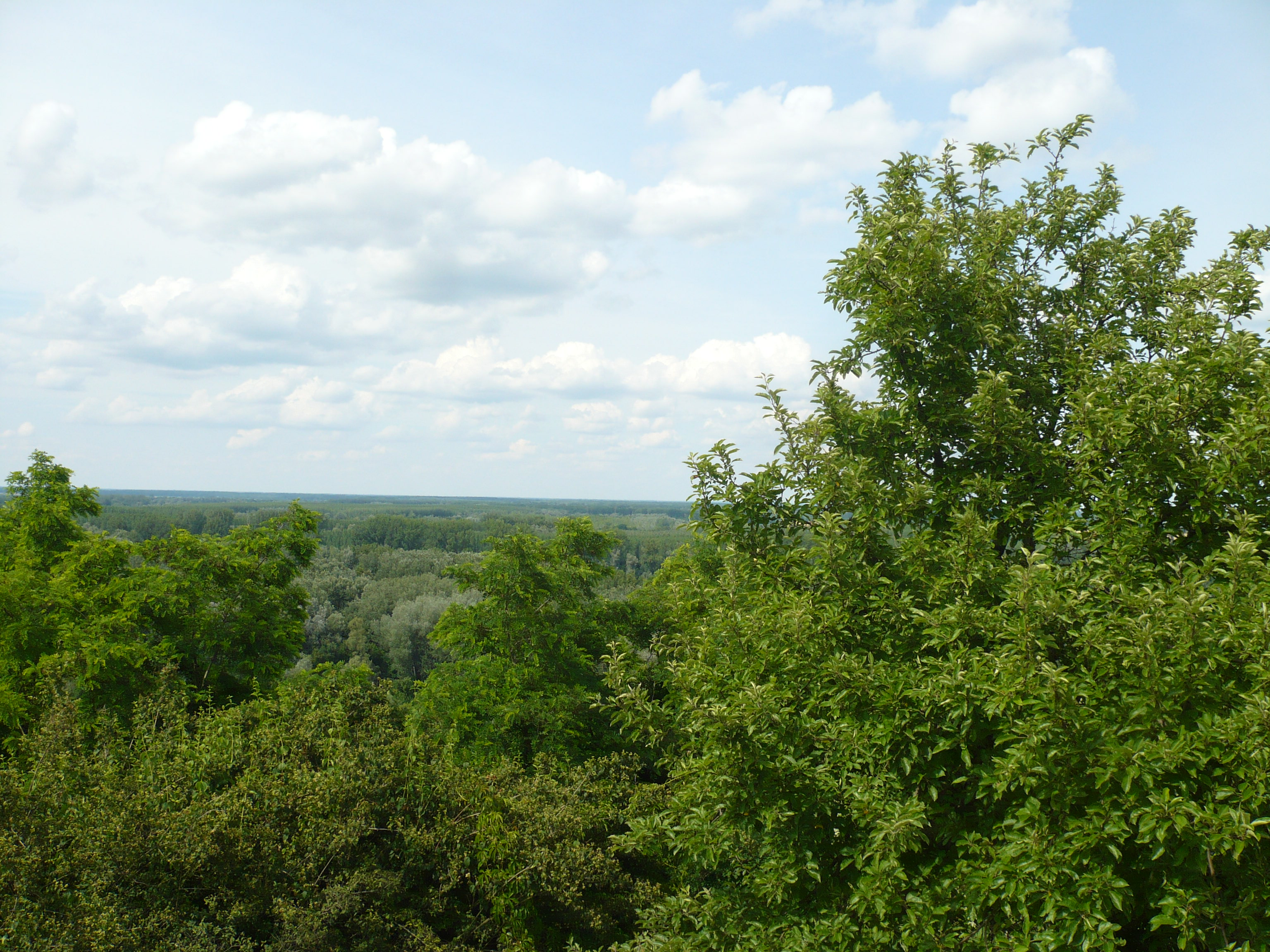 A Felső-Dunamellék Természetvédelmi Rezervátum a batinai hegyről (Kiskőszeg, Horvátország)